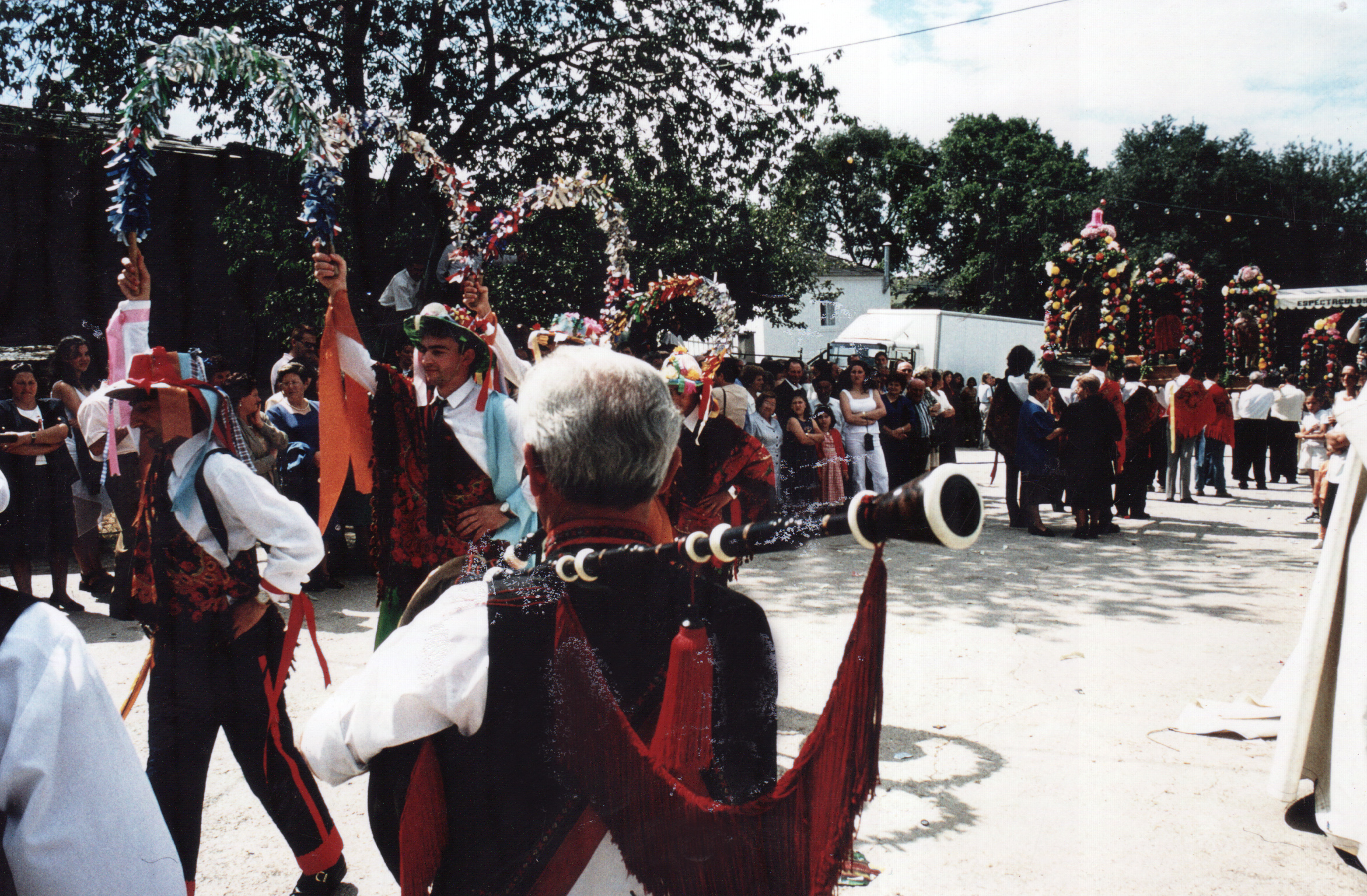 Danzantes de A Cervela (Incio)